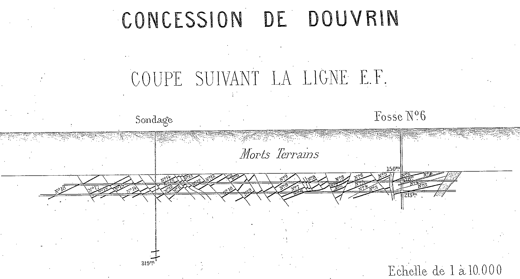 Coupe transversale vers 1880 vers la fosse d'Haisnes de la Compagnie des mines de Douvrin.